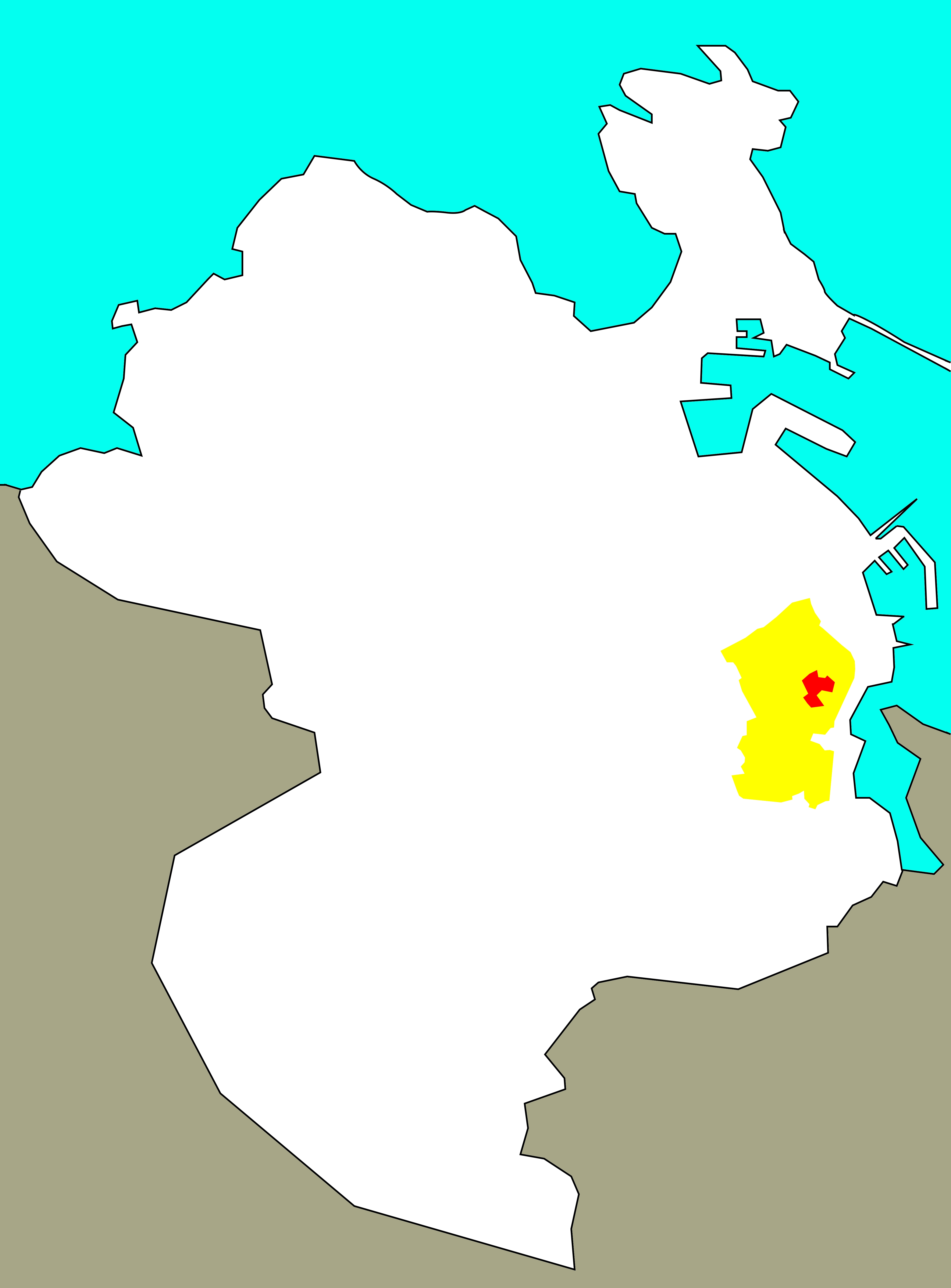 Situación de Curramontes no "barrio-territorio" de Eirís, segundo